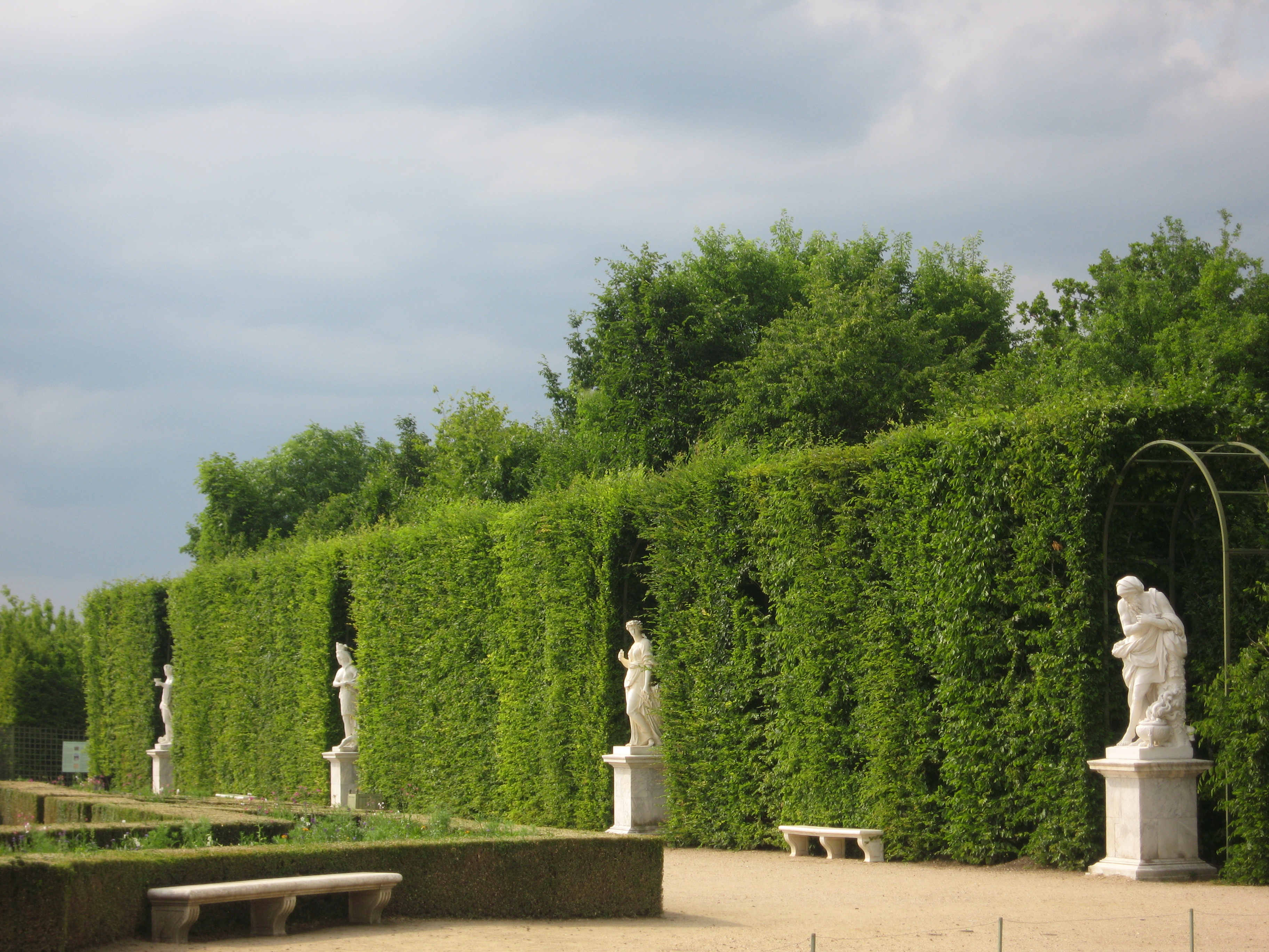 Quatre statues de la Grande Commande : l'Hiver, l'Été, l'Amérique, l'Automne - parterre du Nord